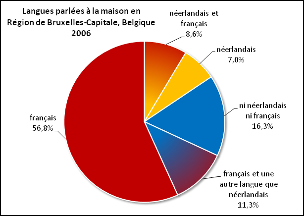 Langues parlées à la maison en Région de Bruxelles-Capitale, Belgique